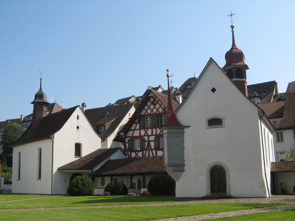 Muttergotteskapelle, Organistenhaus und St.-Anna-Kapelle neben der Stadtkirche Bremgarten